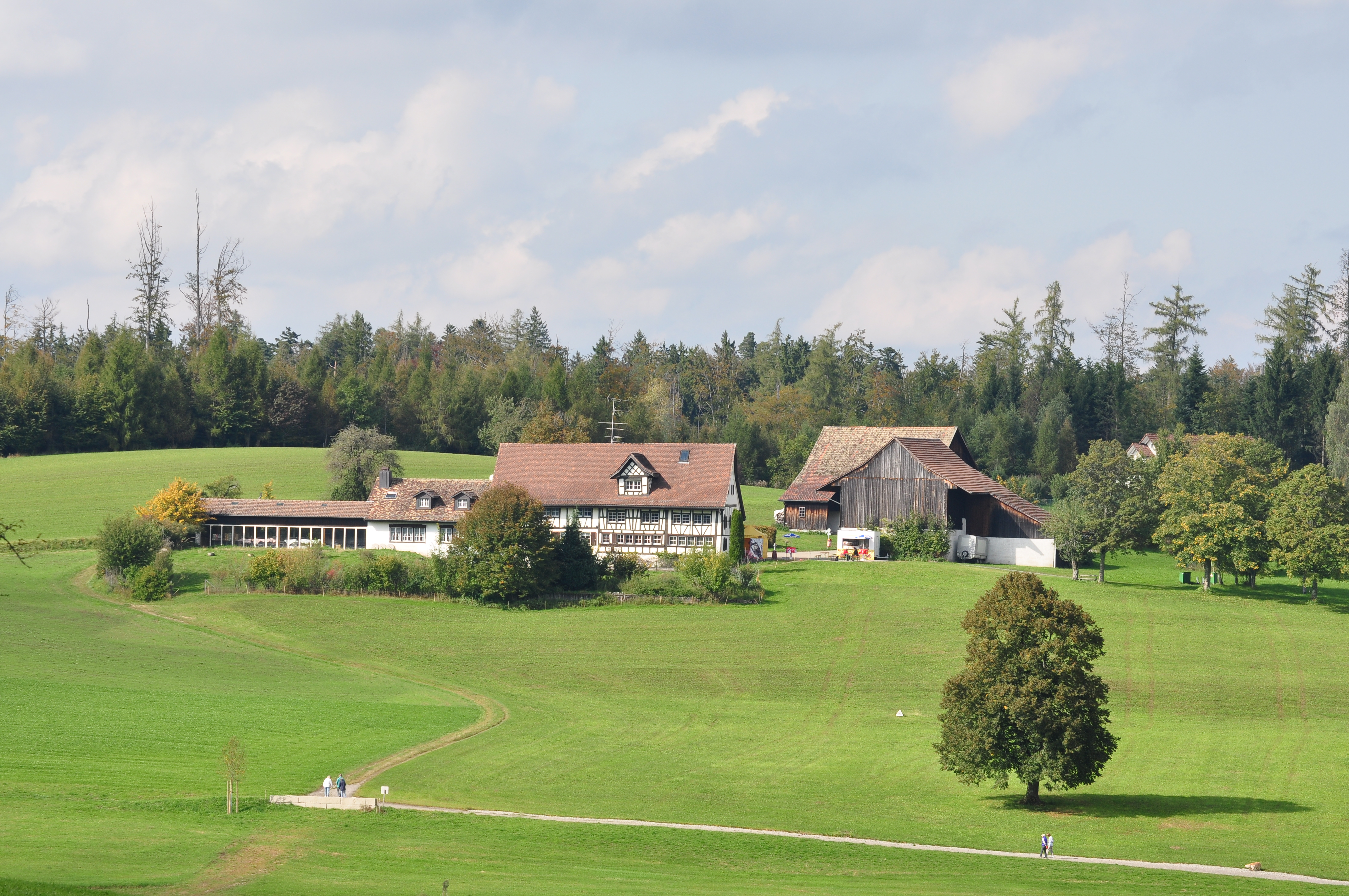 On Pfannenstiel Guldenen (Switzerland)